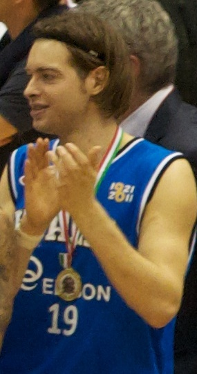 Michele Antonutti